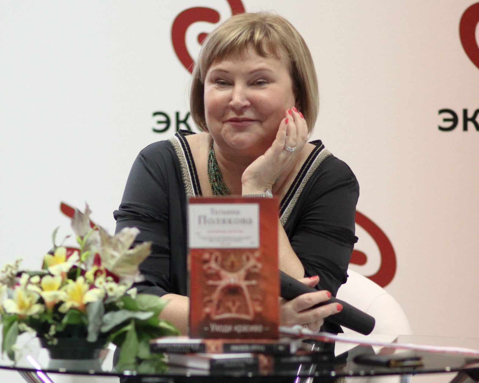 Татьяна Полякова на ММКВЯ 2011